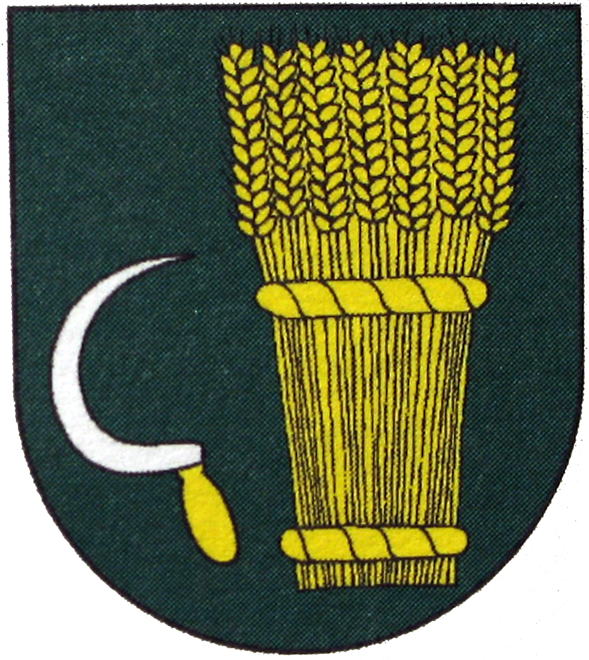 Erb obce Okrúhle (HR: O-30/1996): V zelenom štíte je veľký zlatý, dvakrát previazaný snop, pravo sprevádzaný strieborným pravošikmým kosákom na zlatej rukoväti. Autormi erbu sú Leon Sokolovský, Sergej Pančák a Peter Kónya.